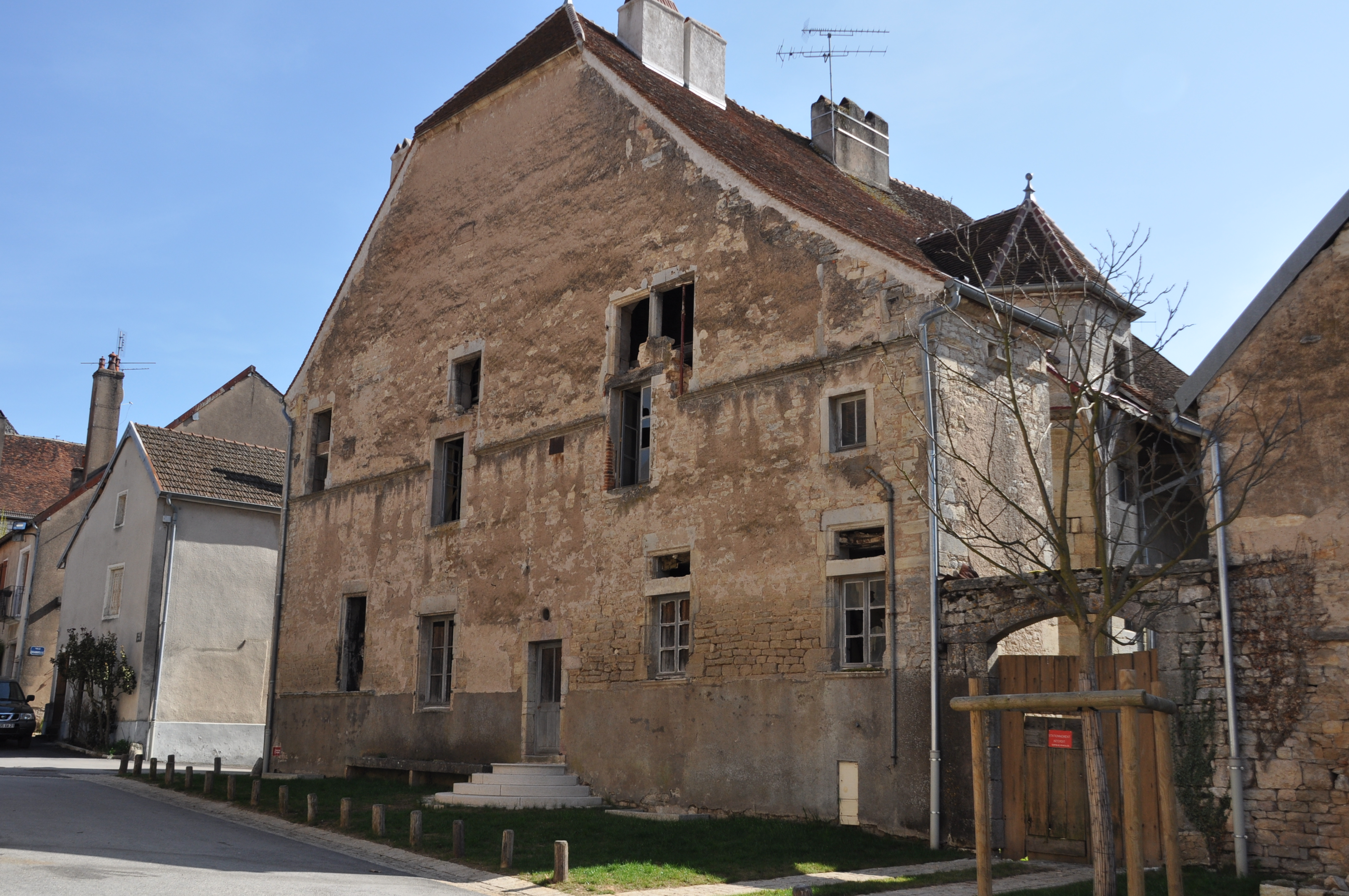 Maison, rue Granvelle, (Inscrit, 1934) .